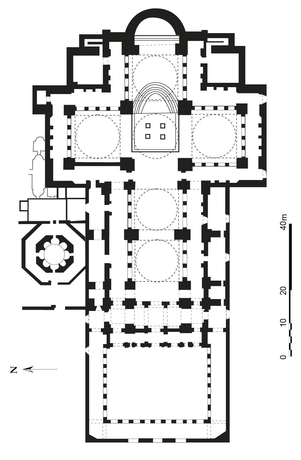 Plan de l'église Saint-Jean le Théologien. Dessin sous Adobe Illustrator d'après le plan dans C. Foss, Ephesus after Antiquity, Cambridge, 1979.